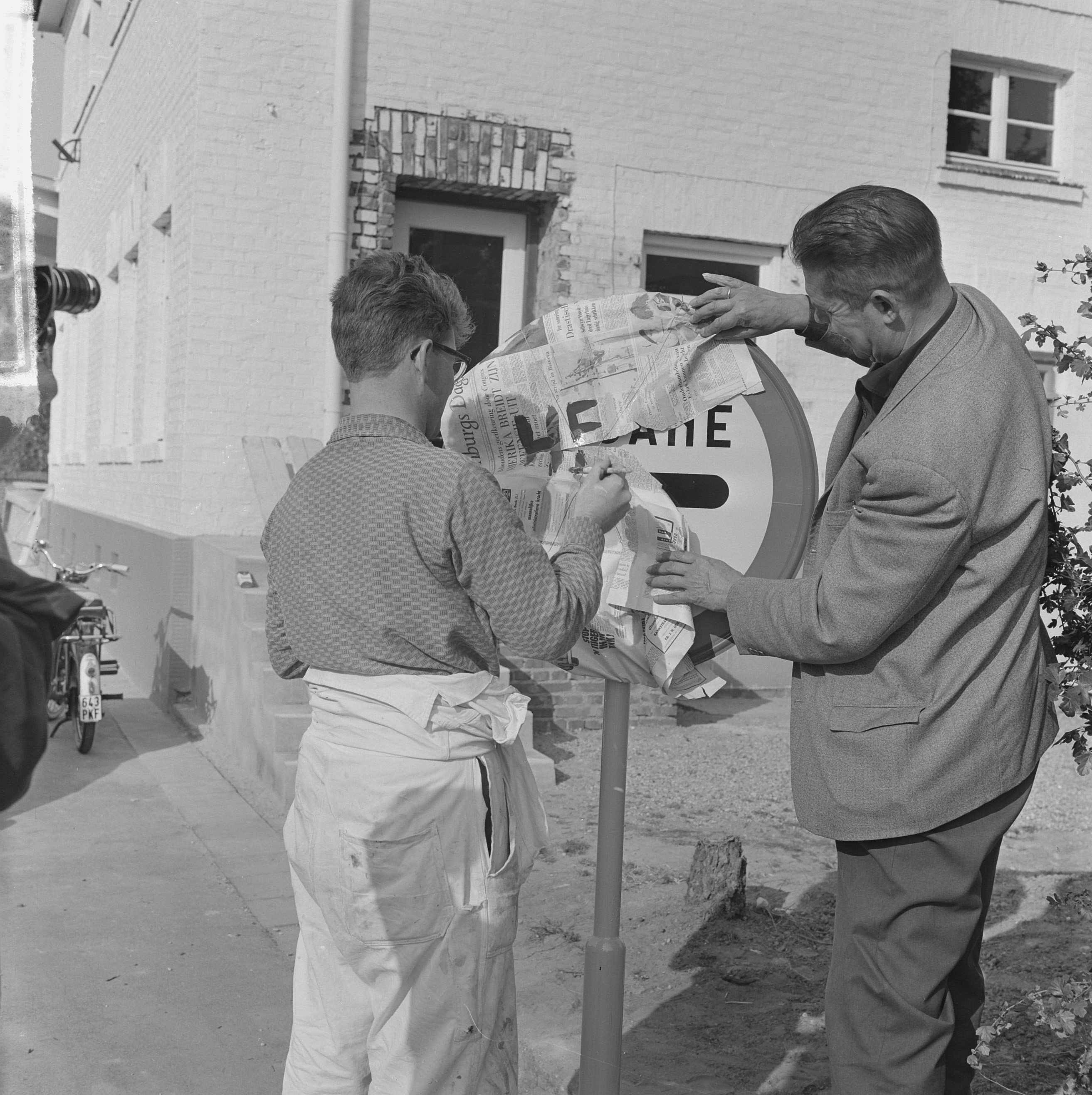 Collectie / Archief : Fotocollectie Anefo Reportage / Serie : [ onbekend ] Beschrijving : Tudderen weer Duits. Bord douane Datum : 31 juli 1963 Locatie : Duitsland, Tüdderen Trefwoorden : borden Fotograaf : Koch, Eric / Anefo Auteursrechthebbende : Nationaal Archief Materiaalsoort : Negatief (zwart/wit) Nummer archiefinventaris : bekijk toegang 2.24.01.03 Bestanddeelnummer : 915-3911